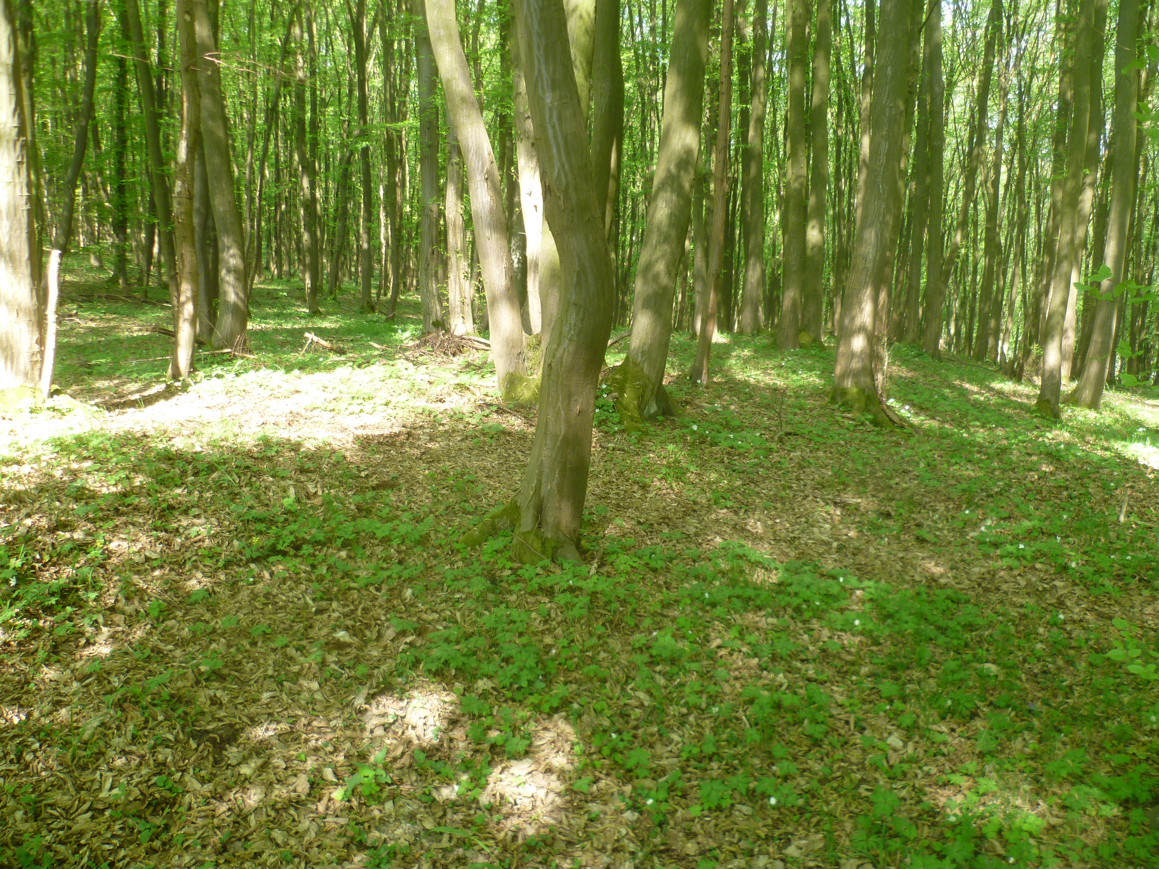 Wall der Wallburg Holzburg im Westbereich